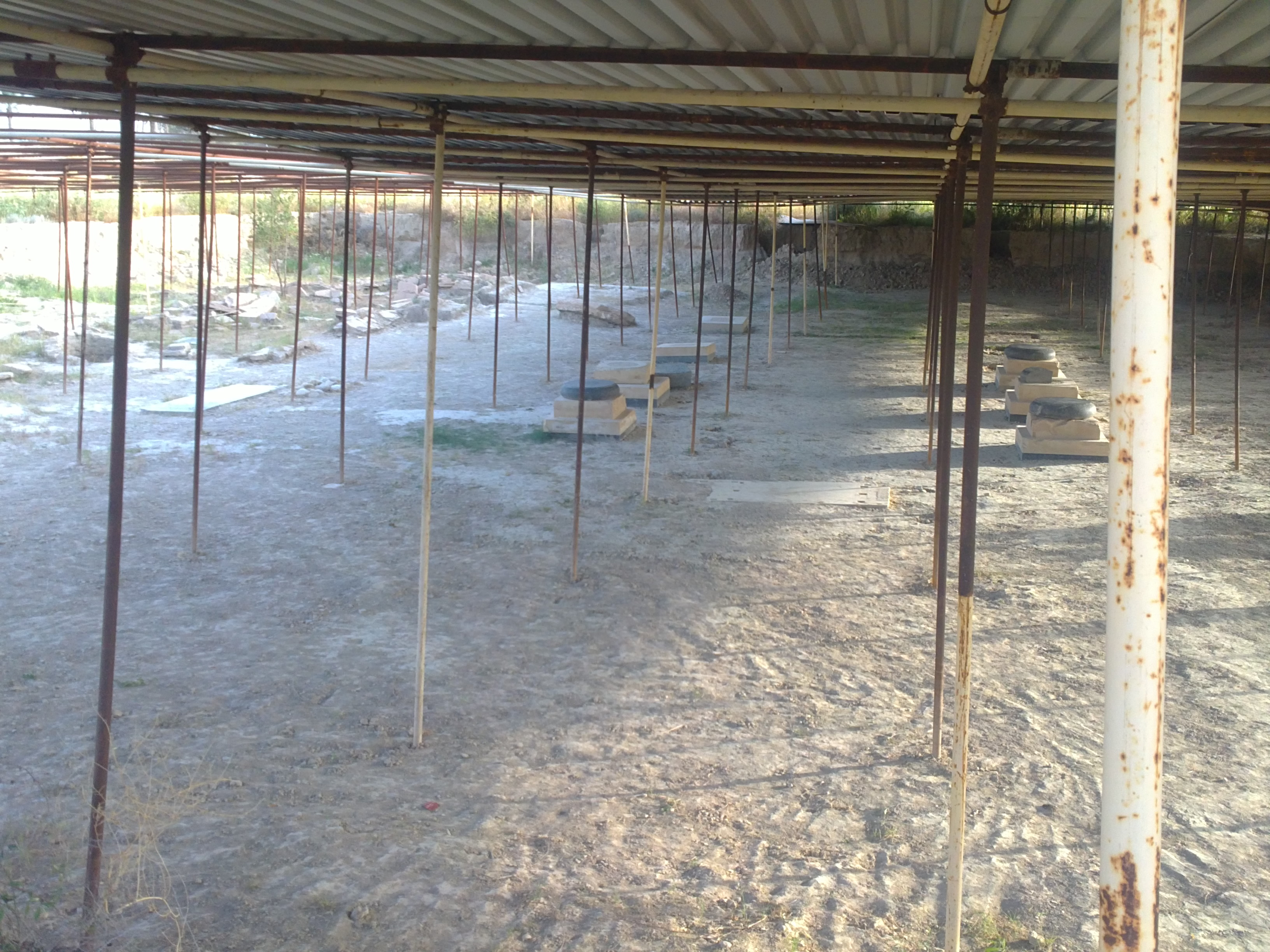 عليرغم مسقف شدن اين اثر،بارش شديد باران در فصل پاييز و زمستان و تابش آفتاب شديد تابستان باعث آسيب رساندن به اين اثر باستاني شده است